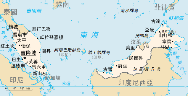 馬來西亞地圖。